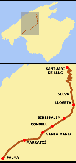 Mapa de la ruta que sigue la Marcha des Güell a Lluc a peu. Imagen creada por Antonio Páramo el 8 de agosto del 2004 y cedida al dominio público.